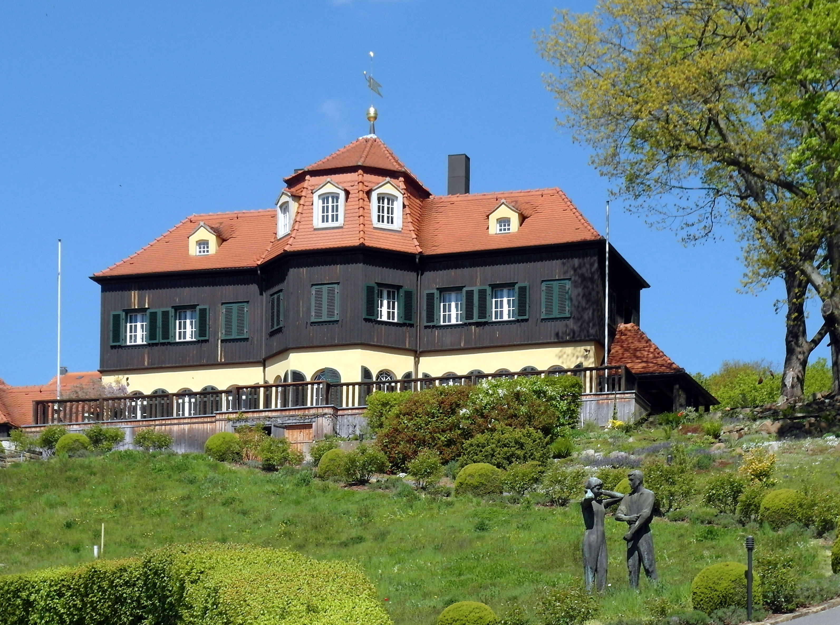 30.04.2017 01445 Radebeul-Oberlößnitz, Weinbergstraße 44 (GMP: 51.111958,13.673589): "Haus in der Sonne". 1770 erbaut, mehrfach umgebaut. Der Name "Haus in der Sonne" stammt vom Dresdner Yenidze-Architekten Martin Hammitzsch. Das von Hammitzsch 1918 umgebaute Gebäude wurde auch wegen Hammitzsch´s Ehe mit der Halbschwester Angela von Adolf Hitler bekannt. Im Weinberg wurden Nazigrößen wie Herrmann Göring empfangen. In DDR-Zeiten war das Anwesen im Besitz der Dental Kosmetik Dresden und zuletzt in katastrophalem Zustand. 1993 privatisiert und aufwendig saniert. Sicht von Süden. [SAM9598]20170430220DR.JPG(c)Blobelt